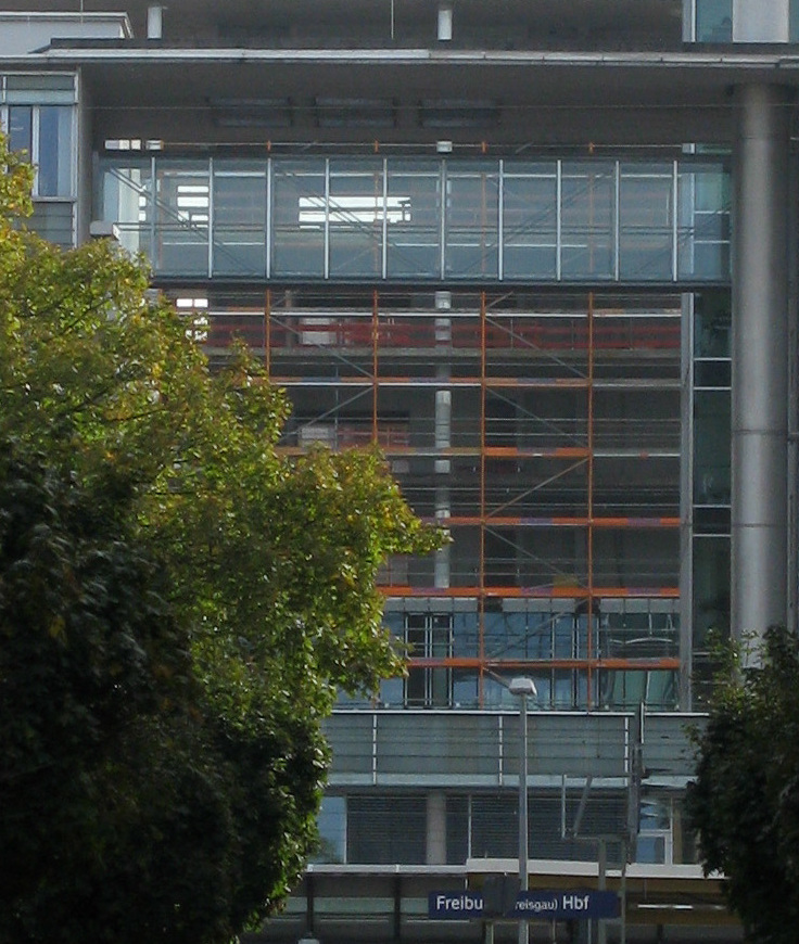 Neubau der Volksbankzentrale in Freiburg mit Bahnhofsturm von der Egonstraße